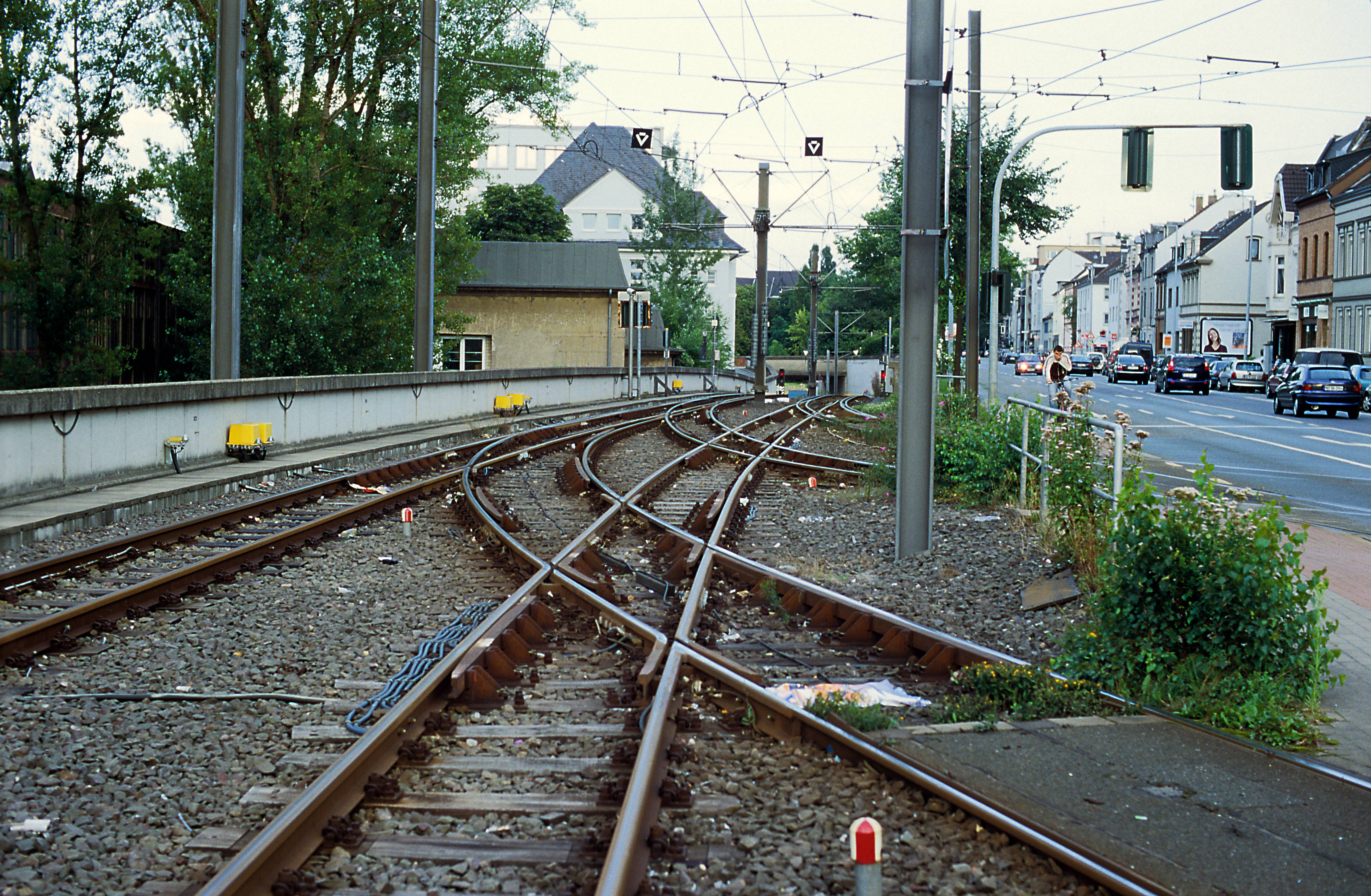 die Streckengleise aus dem Tunnel von Mülheim Hbf verzweigen sich vor der Haltestelle Königstraße. Ganz rechts zweigt die Meterspurstrecke nach Uhlenhorst ab, rechts im Vordergrund geht es regelspurig nach Duisburg, links ins Bw der Mülheimer Verhehrsbetriebe